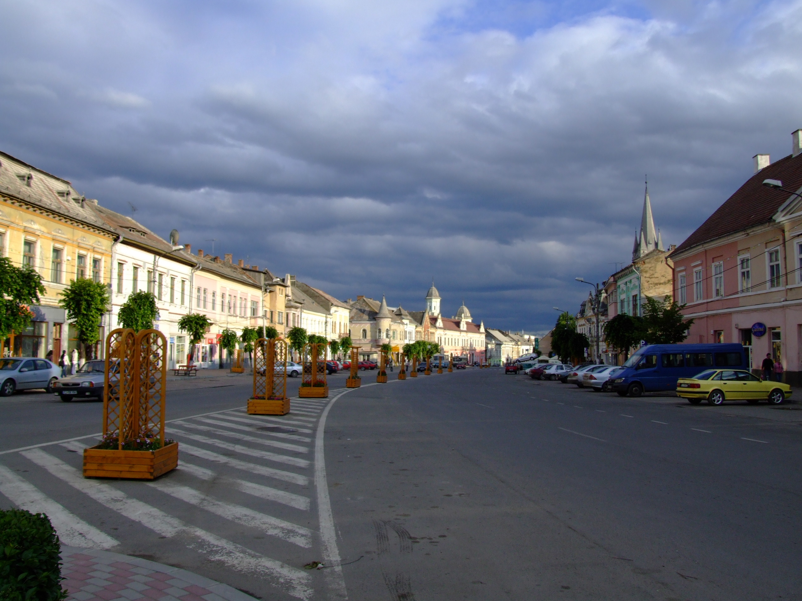 Turda - Piaţa Republicii